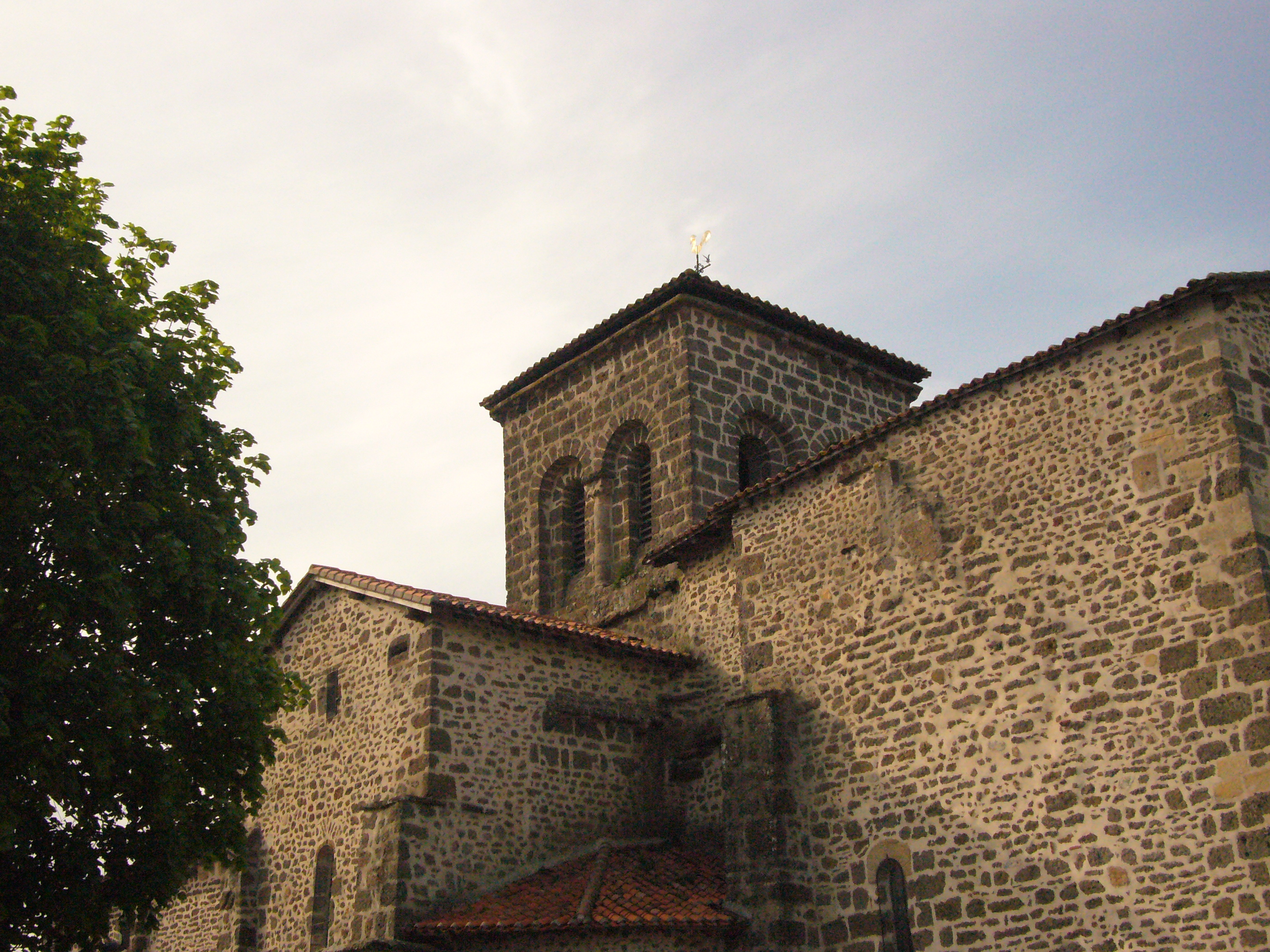 Eglise de Chassenon, Charente, France